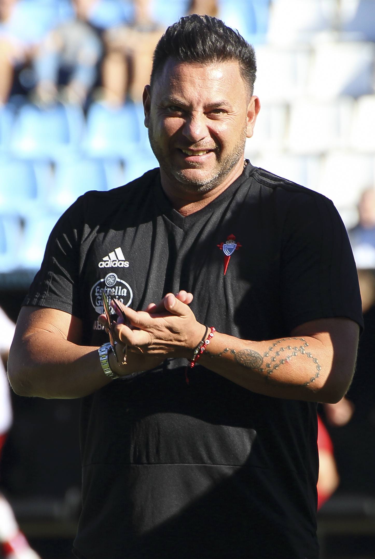 Presentación RC Celta - Temporada 18/19